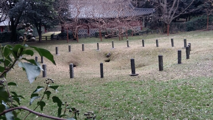 한국어 (조선): 삼성혈의 모습을 촬영함